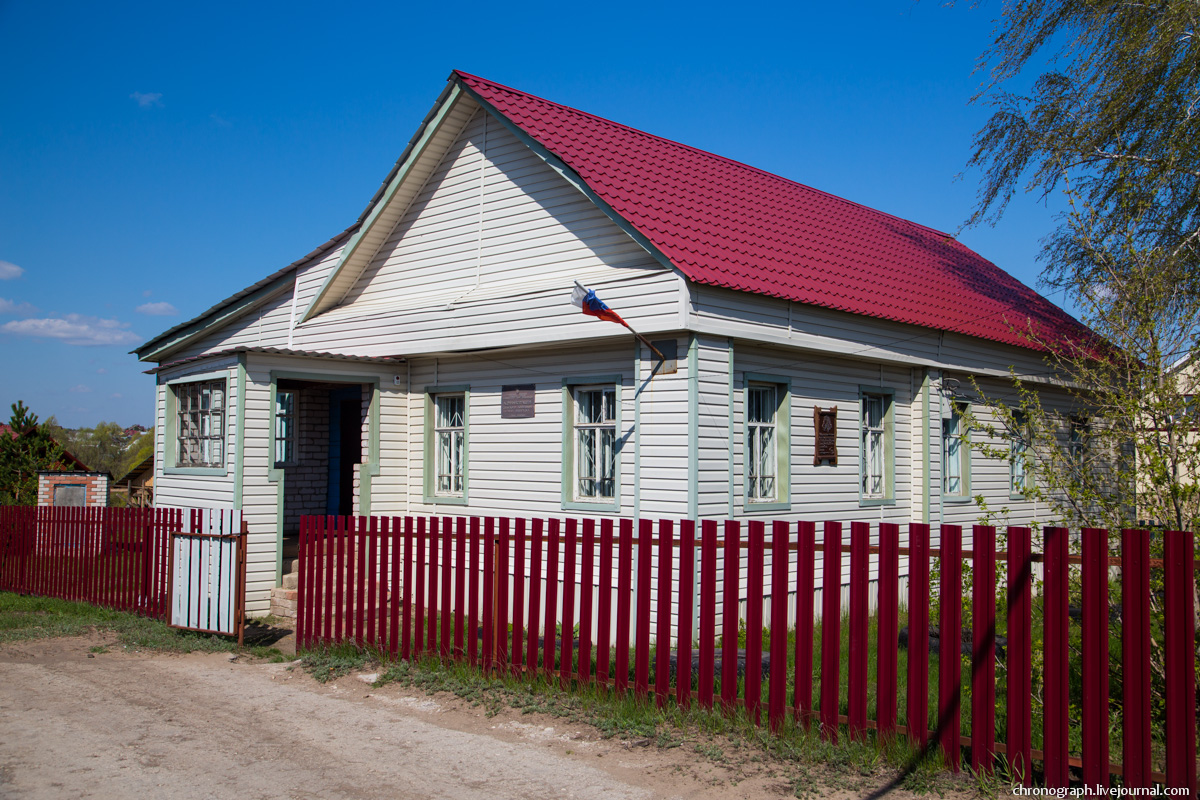 Администрация села, улица Советская, Старая Бинарадка, Самарская область, Россия